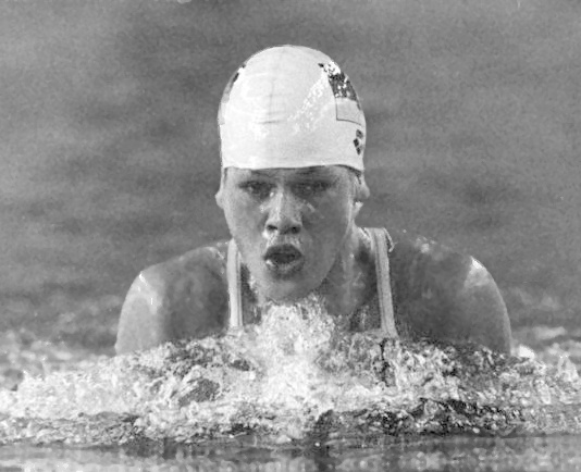 Sylvia Gerasch ADN-ZB Hirndorf 19.6.87 Erfurt: DDR-Schwimmeisterschaften Silke Hörner (80 DHfK Leipzig) siegte über 100 m Brust in einer Jahresweltbestzeit von 1:09,60 vor Weltmeisterin Sylvia Gerasch.